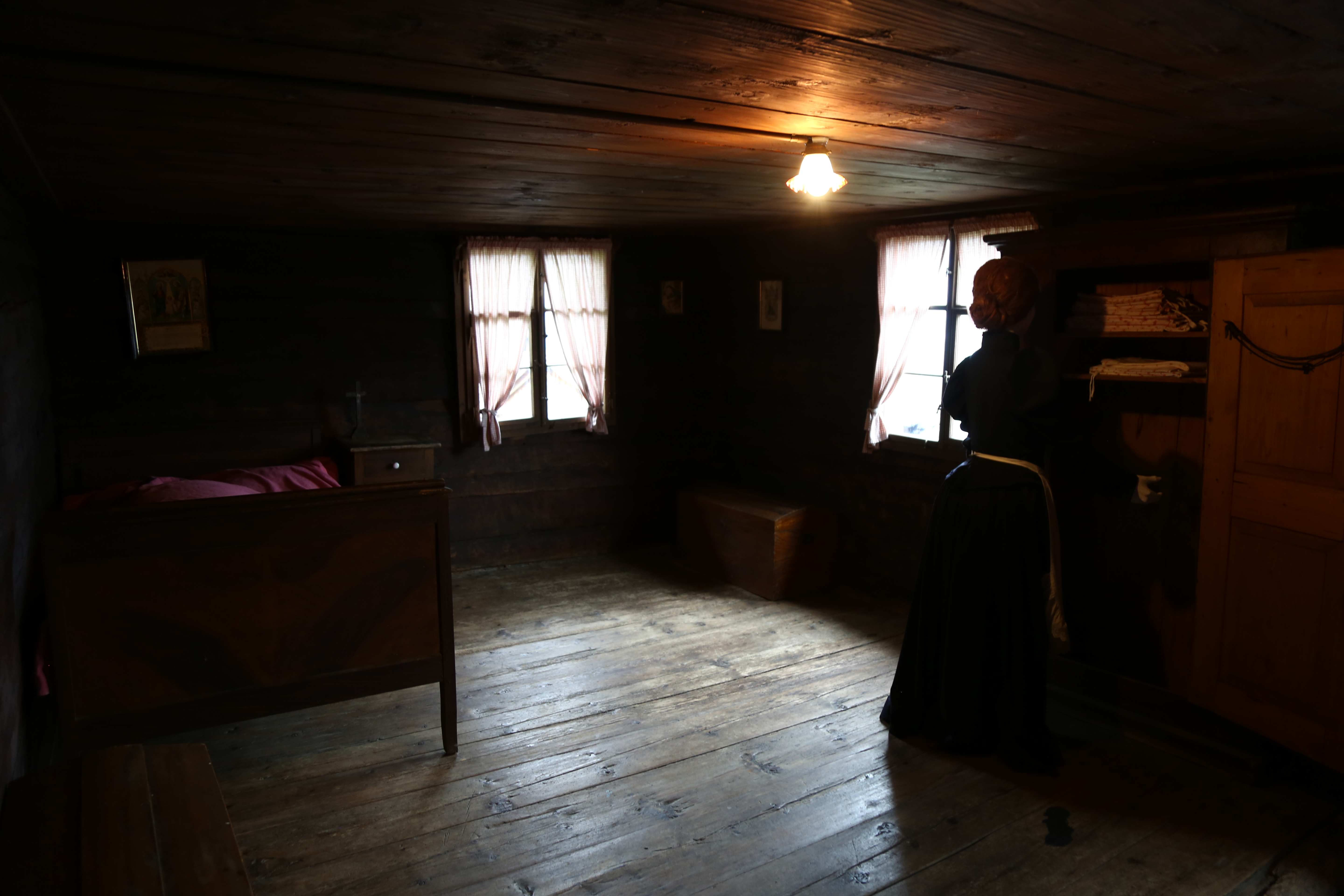 Walserhaus Triesenberg, Innenraum